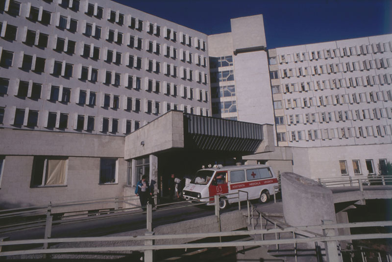 Chisinau.